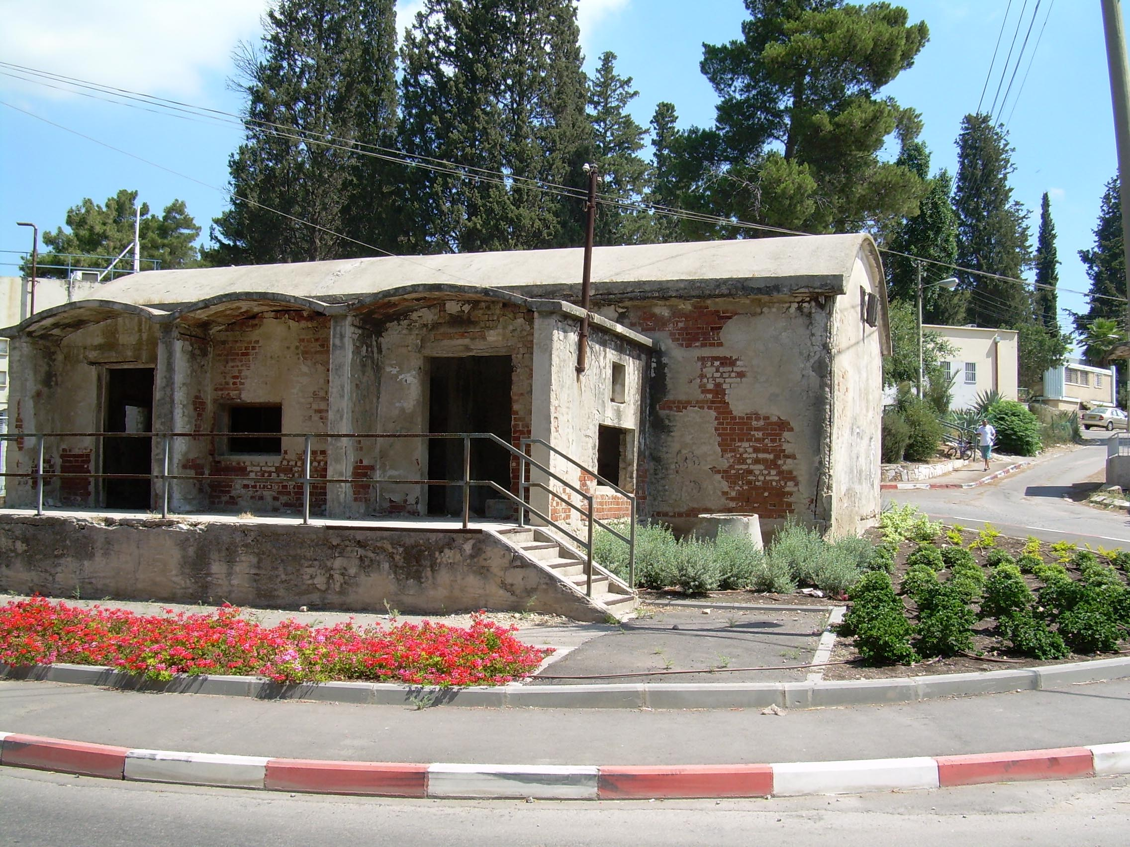 בית הקירור הישן בכפר חסיחדים